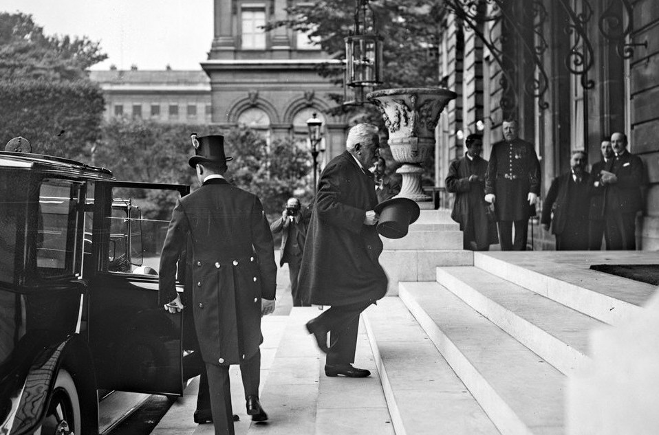 Le président de la République Alexandre Millerand arrivant à la présidence de la Chambre des députés (hôtel de Lassay) lors de la crise institutionnelle de 1924.